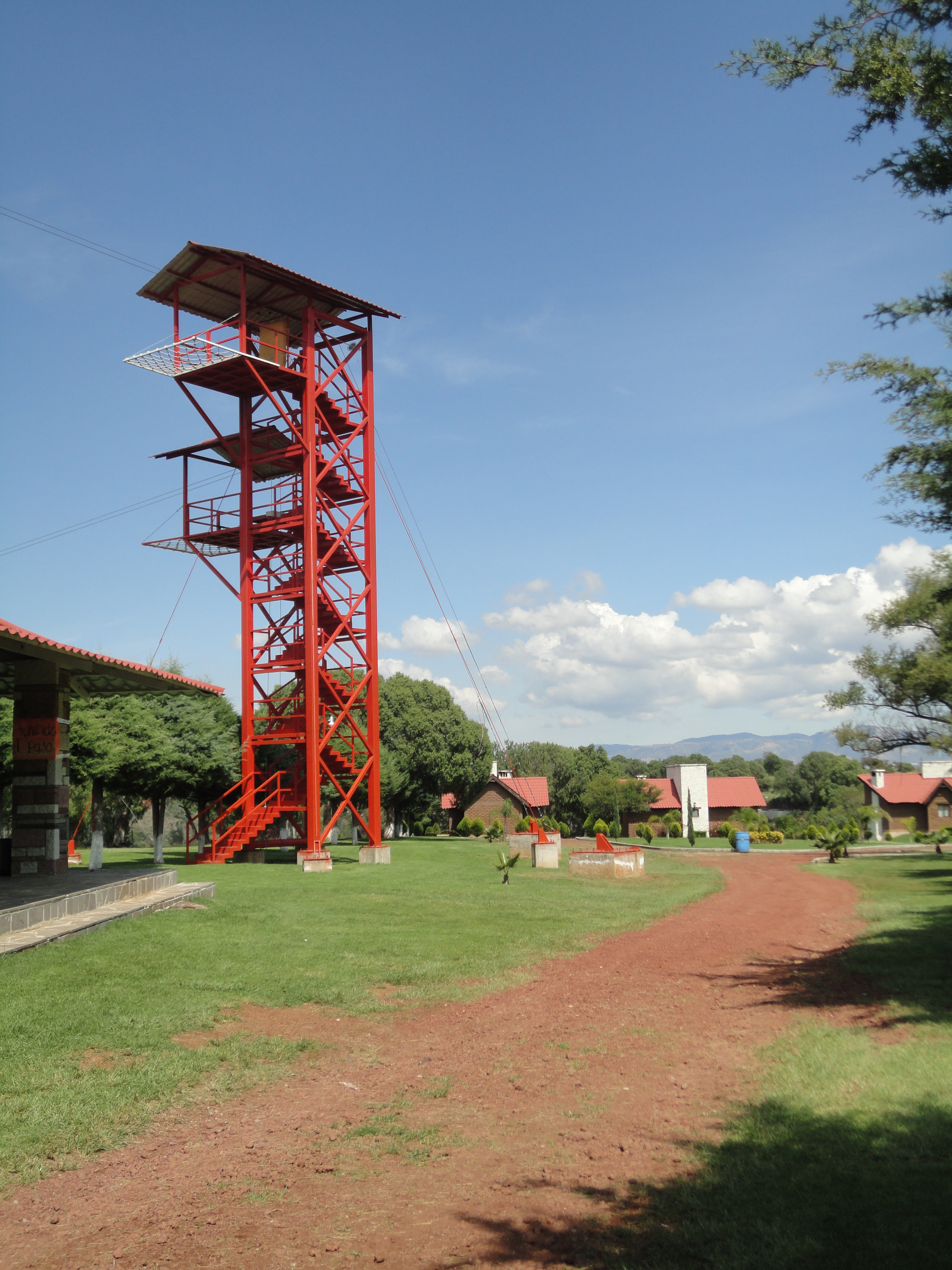 Tirolesa